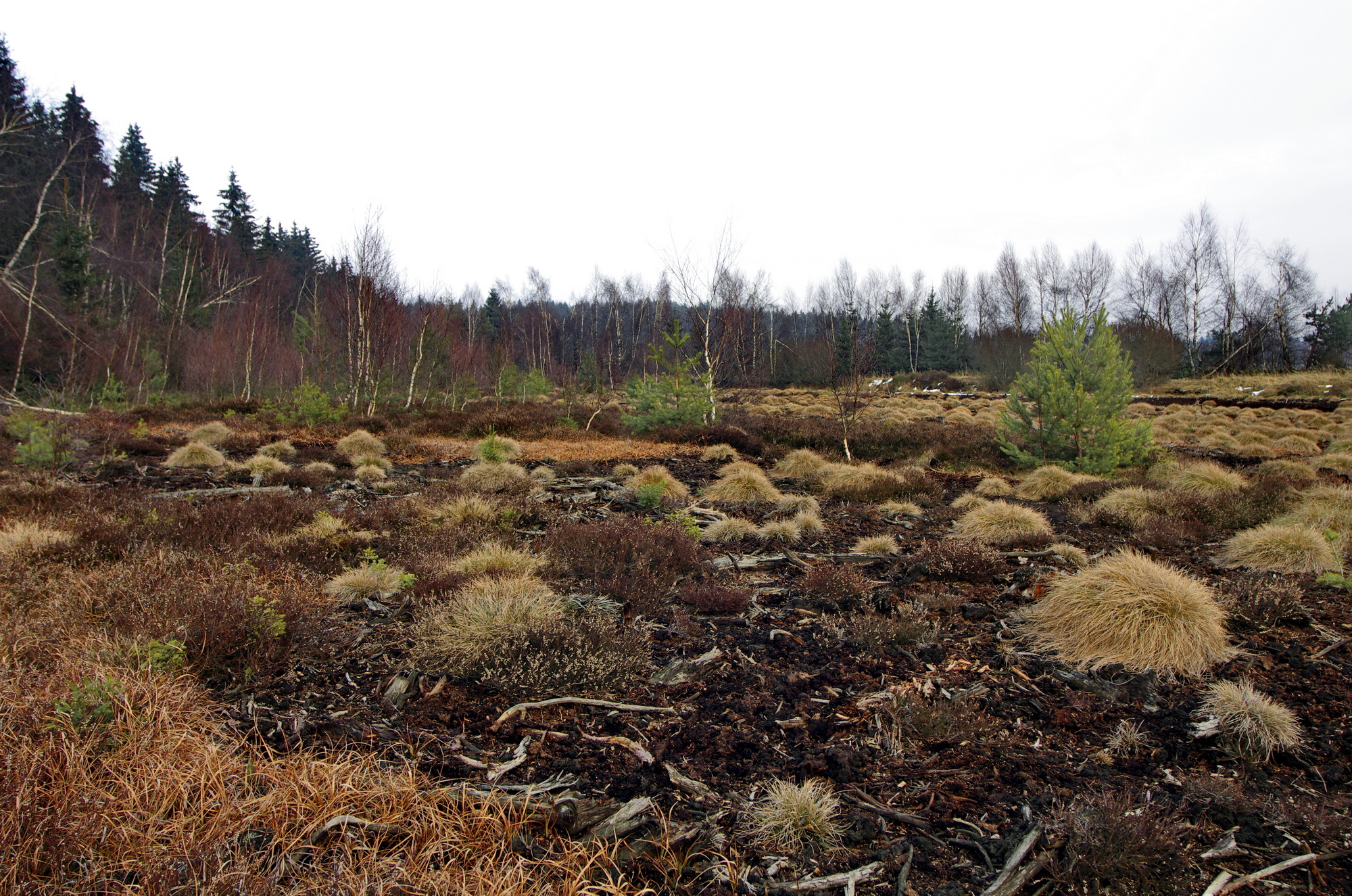 Evropsky významná lokalita Krásenské rašeliniště, Krásno, okres Sokolov